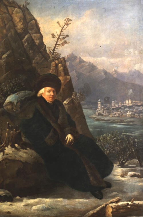 Сальватор ТОНЧИ (Николай Иванович).1756, Рим - 1844, Москва Портрет поэта Гавриила Романовича Державина. 1801. В собрании Государственной Третьяковской галерее хранится подобный портрет и этюд к нему, датированный 1801 годом. Холст, масло. 247х187. Пост. в 1920 из дома генерал-губернатора, Иркутск. Иркутский художественный музей